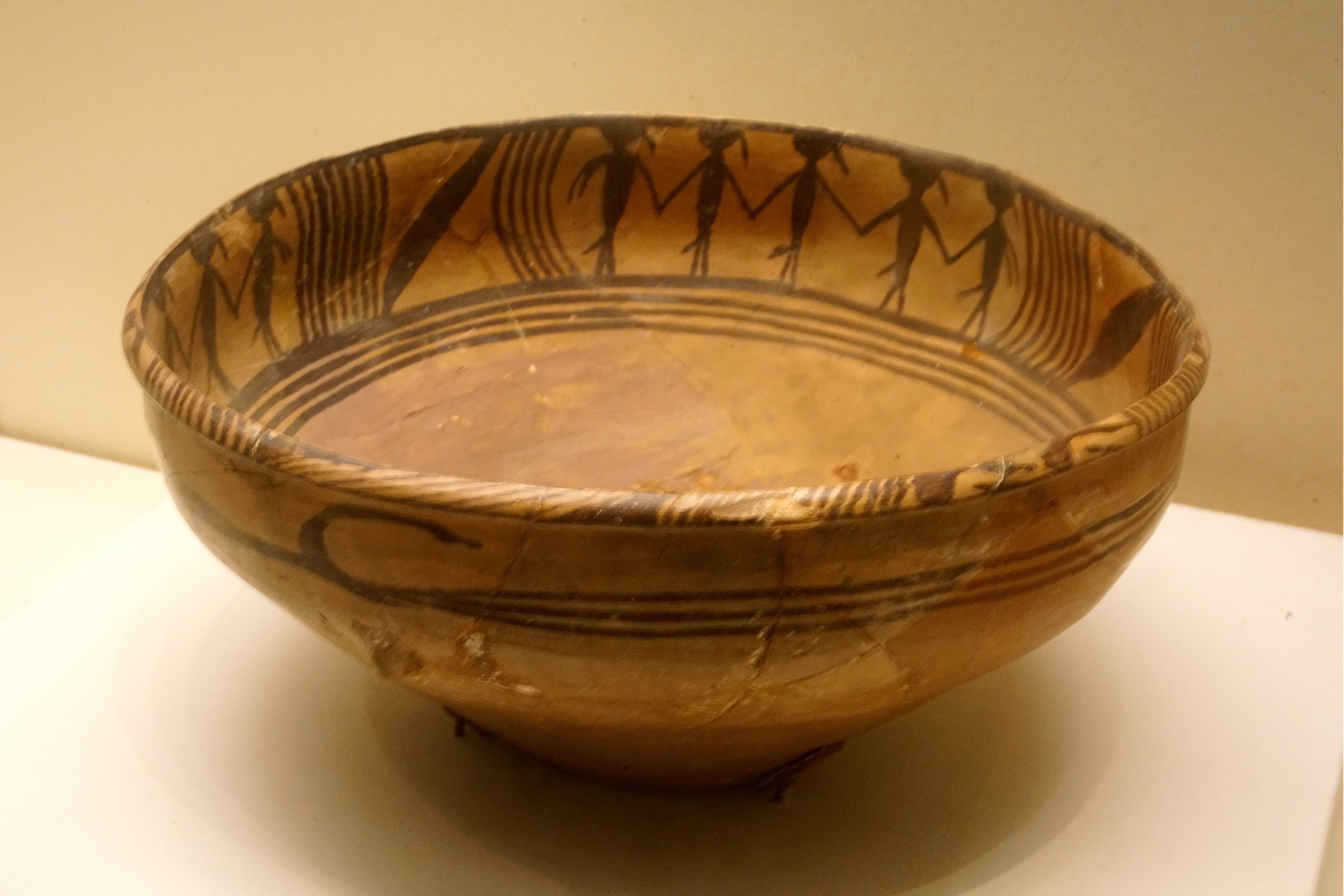 中文（中国大陆）: 舞蹈纹彩陶盆